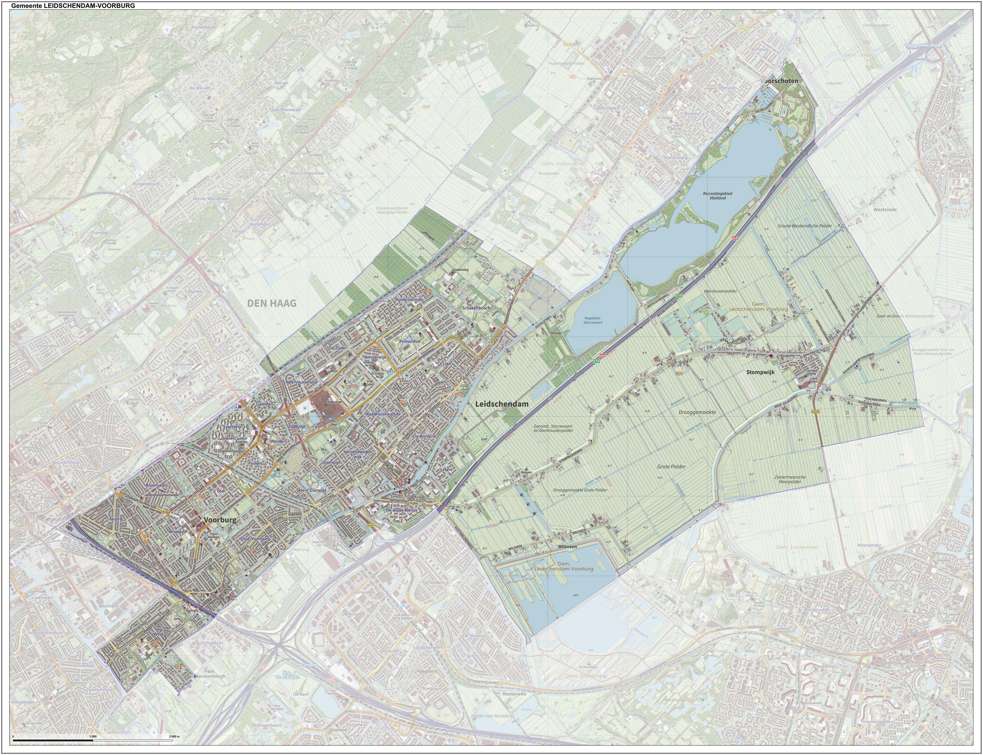 Topografische gemeentekaart. Resolutie: 400 pixels/km. Kaartbeeld samengesteld uit de open geodata van de Top10NL en Top25namen (Kadaster), Creative Commons-BY licentie. Gebouwvlakken uit open geodata BAG extract. Wegen uit de OpenStreetMap, OpenStreetMap community. Reliëfschaduw uit de Actuele Hoogtekaart AHN2. Samenstelling en kleurenschema: Jan-Willem van Aalst, met QGIS. Zie ook de Legenda.